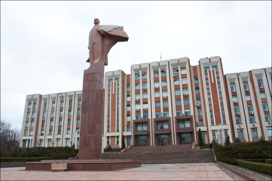 Тирасполь. Парламент ПМР.